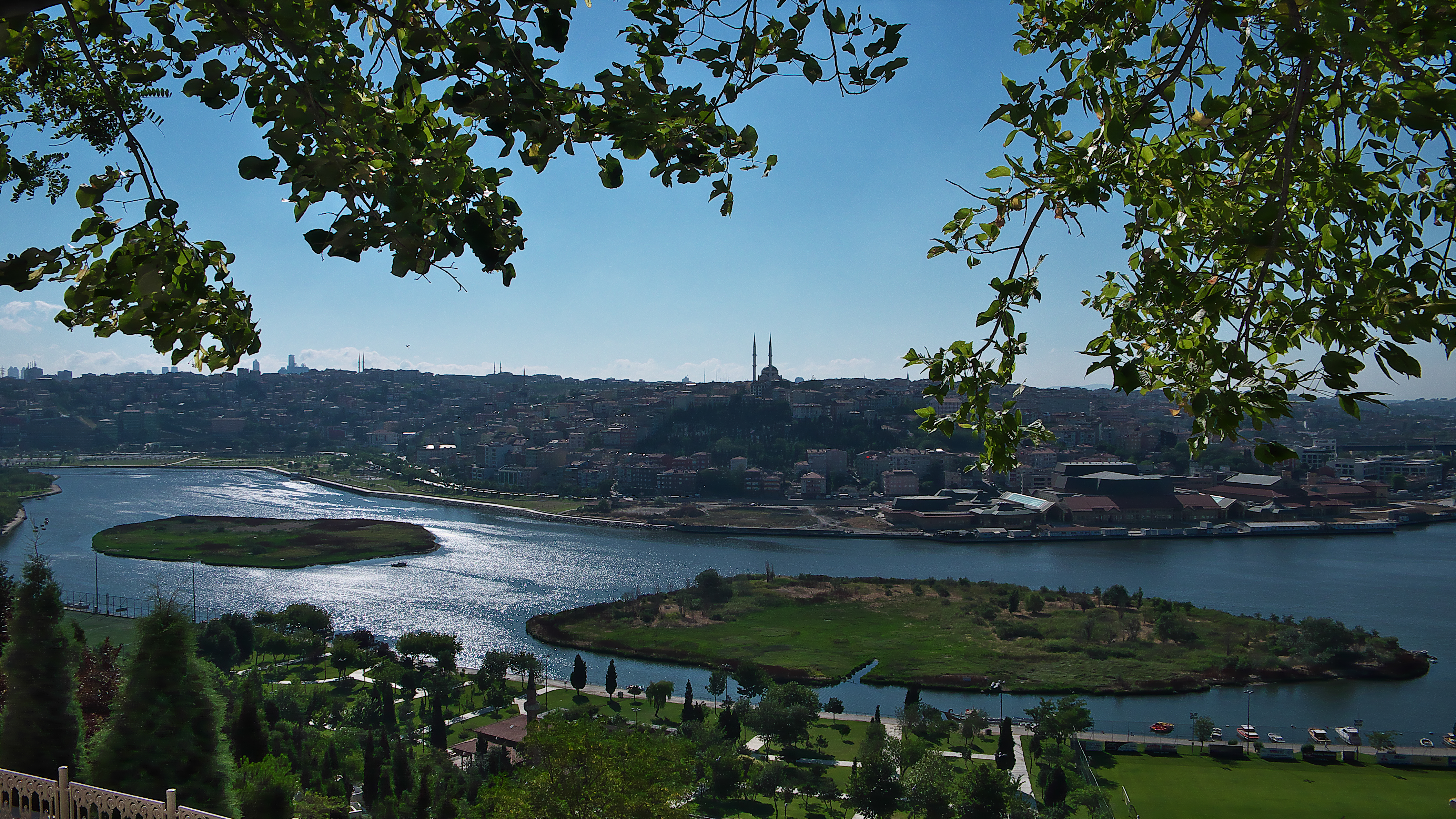 Panorámica desde la terraza del café.